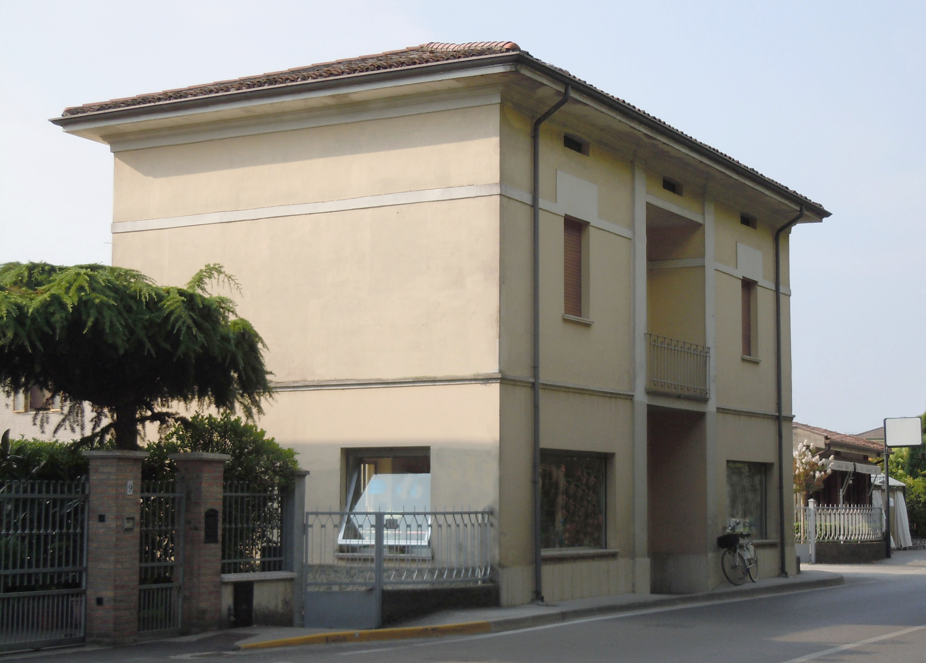 Castel Goffredo, il fabbricato viaggiatori della stazione del tram in esercizio tra il 1930 e il 1933